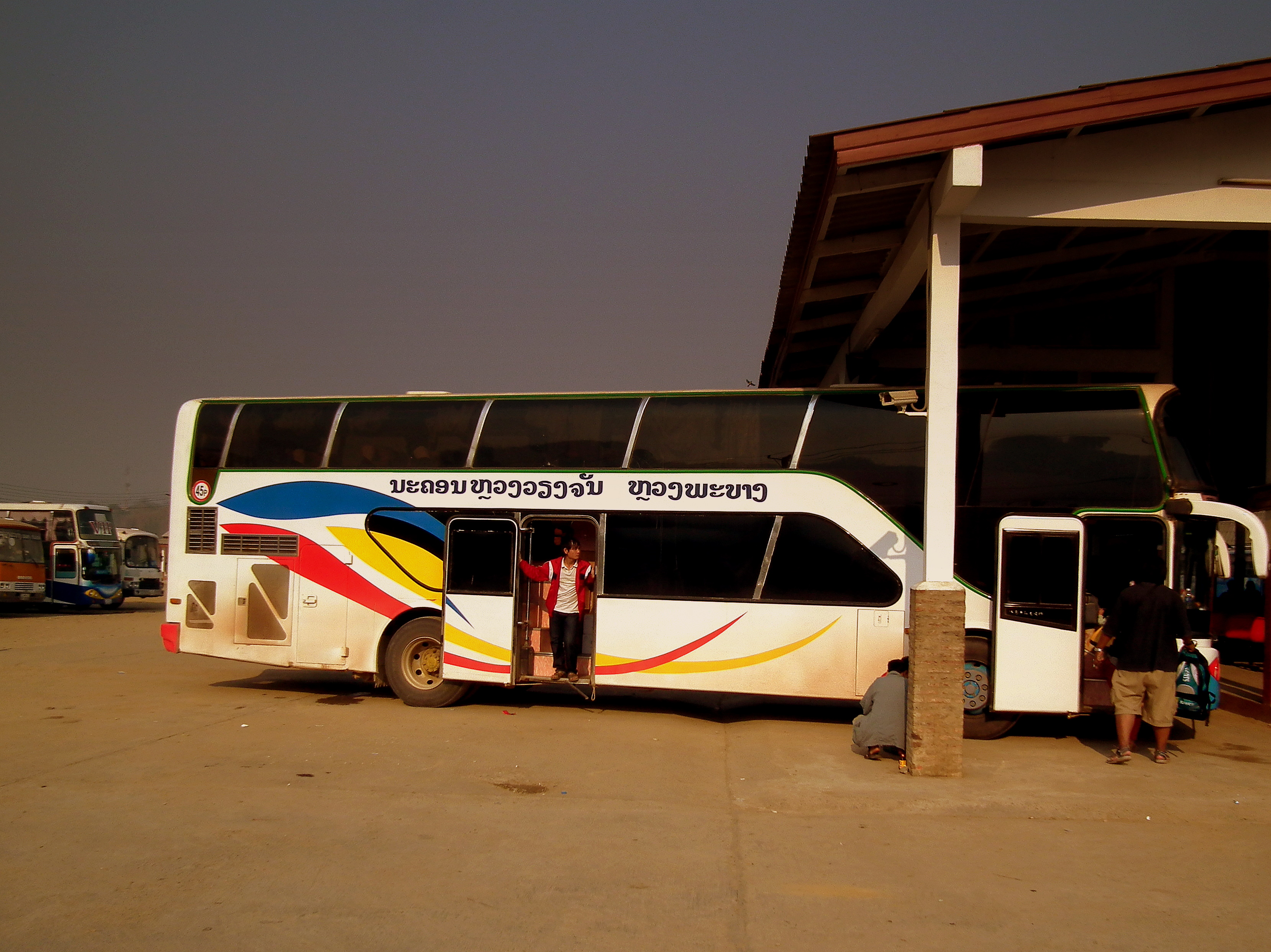 LUANG PRABANG BUS STATION LAOS FEB 2012